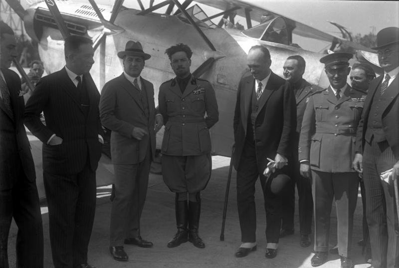 Eine italienische Flugzeugstaffel fliegt über den Ozean nach Brasilien! Den ersten Massenflug über den Ozean unternimmt eine italienische Staffel von 12 Flugzeugen, die unter dem Kommando des italienischen Generals und Luftfahrtsministers Balbo stehen. Der Flug geht von der westlichen Küsten Italiens in Etappen nach Brasilien. Der italienische Diktator Mussolini ist der Protektor dieses Unternehmens. Der italienische General und Luftfahrtsminister Balbo, welcher in dem Geschwaderflug das Kommando hat. [Text Bild 102-10868] Information added by Wikimedia users.*